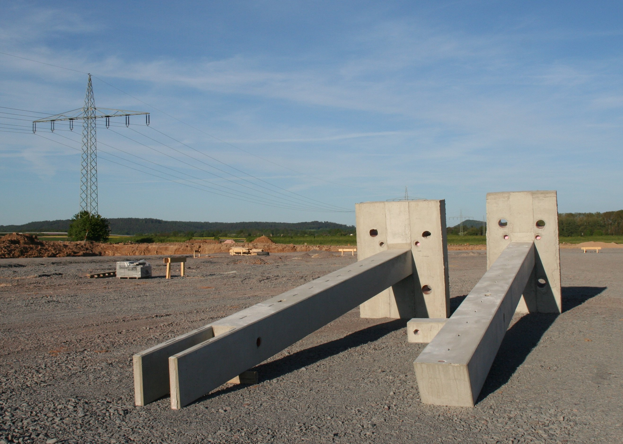 Fertigteilstütze mit angeformten Fundament, Bst. in Coburg.